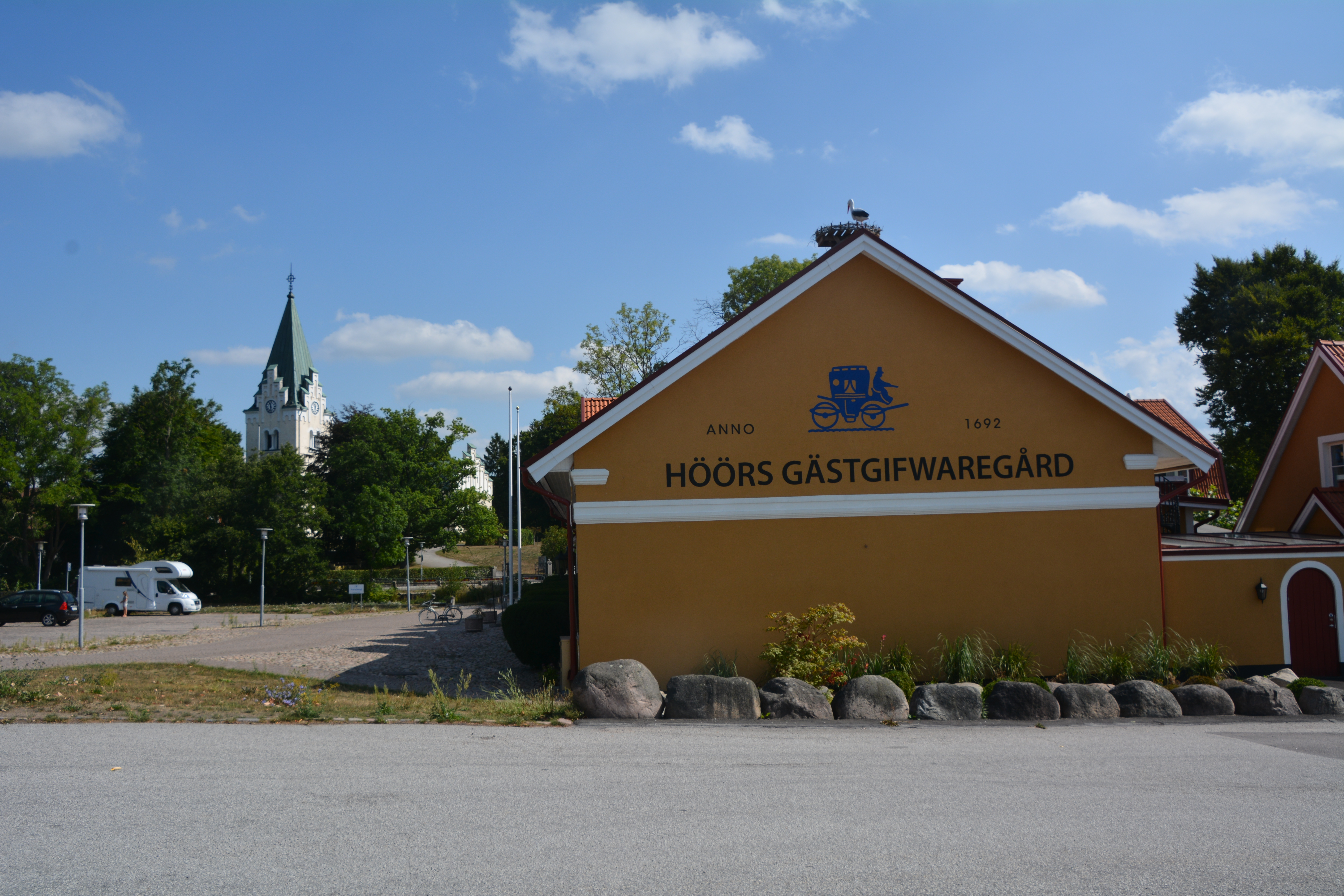 Höörs Gästis